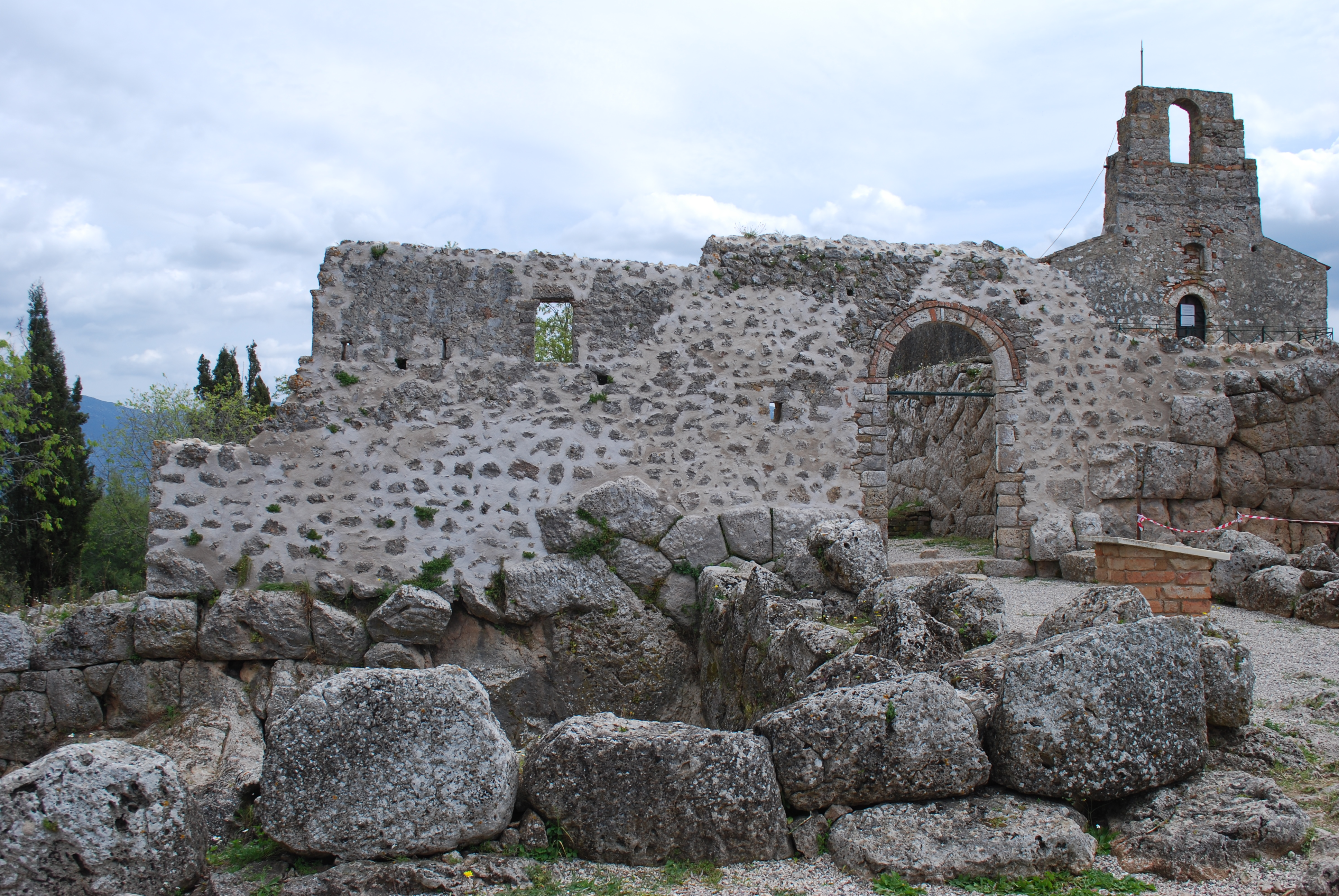 Vue du Nécromanteion.